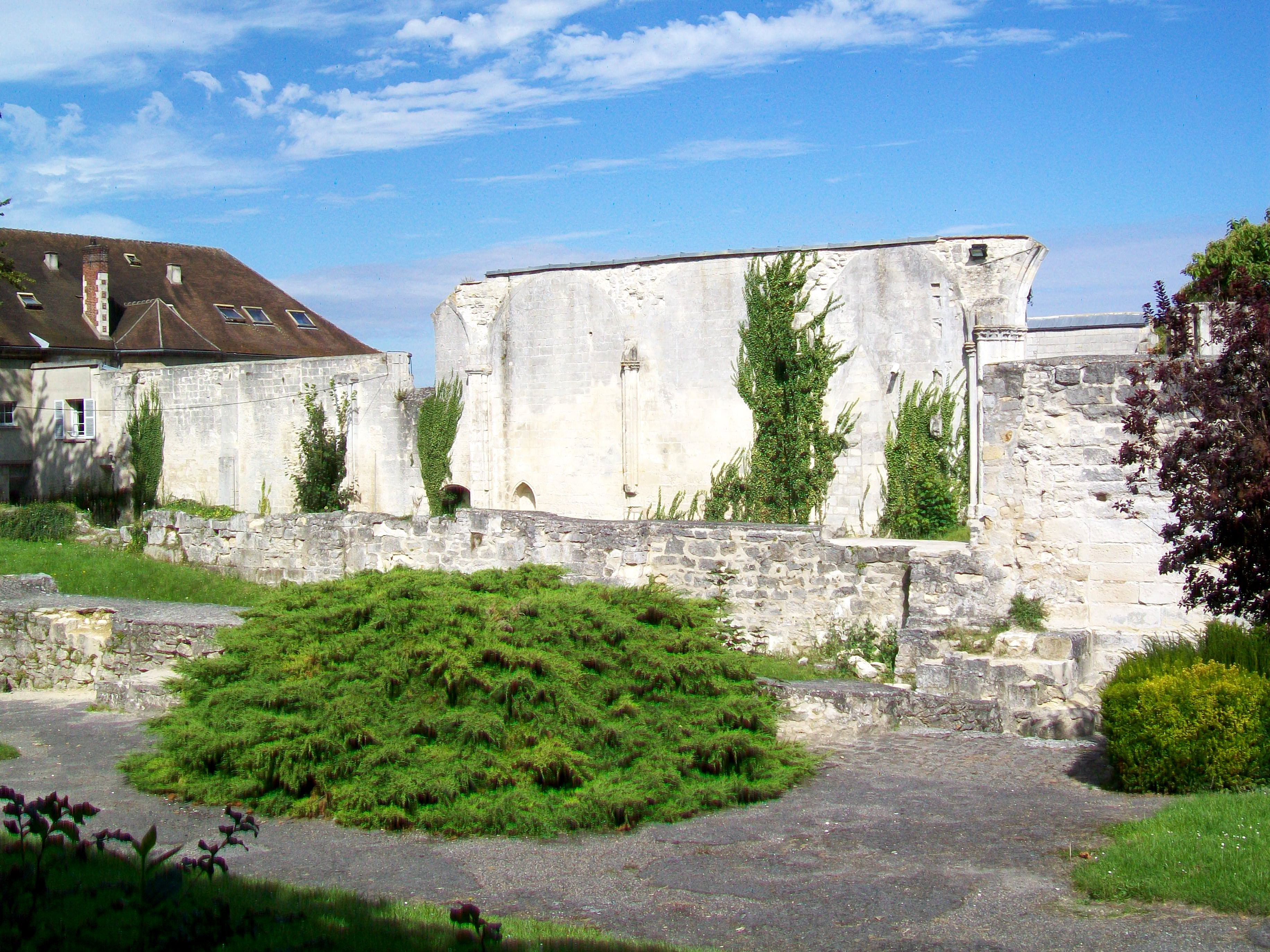 Les ruines de l'abbatiale de l'ancien prieuré Saint-Arnoul, place Saint-Simon.